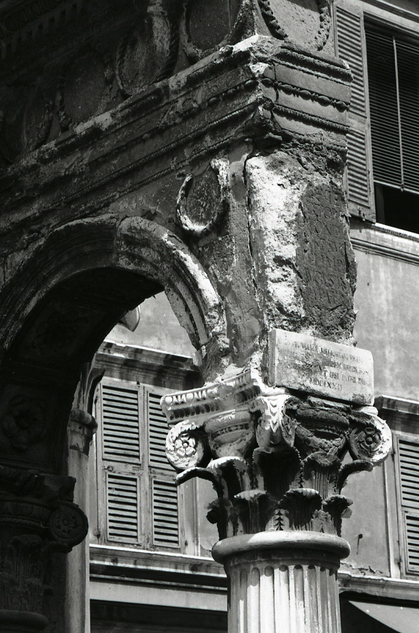 Servizio fotografico : Ferrara, 1980 / Paolo Monti. - Strisce: 3, Fotogrammi complessivi: 7 : Negativo b/n, gelatina bromuro d'argento/ pellicola ; 35 mm. - ((Sul portanegativi: N[I]K[MA]T FP4 e iscrizione didascalica e documentaria manoscritta a penna nera: "[...] Arco del Cavallo 18-24". - All'interno del portanegativi: la serie è anche identificata da una linea verticale e orizzontale pennarello nero che separa la suddetta serie dalla successiva di soggetto diverso. - Occasione: Legge regionale n. 28 della Regione Emilia-Romagna. Documentazione e mostra I.P.A.B. - Fonte: Fattura di Paolo Monti: IV. Commesse/ Fattura n. 19/ Documentazione oggetti mostra del '700 emiliano ed esposizione a Palazzo Pepoli Campogrande (1981/08/05). N. 231 riprese (462 stampe 18x24). - Fonte: Agenda di Paolo Monti: Nikon Leika 3001-/ Monti 1978 (1978-1982), presso Archivio Paolo Monti. - Fonte: Fattura di Paolo Monti: IV. Commesse/ Fattura n. 52/ Legge regionale n. 28 - Mostra '700 Palazzo Pepoli (1980/11/29), presso Archivio Paolo Monti. N. 62 stampe formato 18x24 oggetti della Mostra del '700 emiliano a Palazzo Pepoli